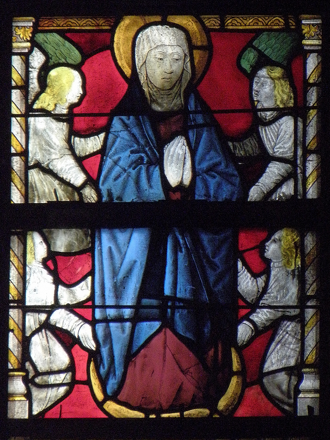 Verrière du transept sud de l'église Saint-Germain de Rennes (35). Détail.